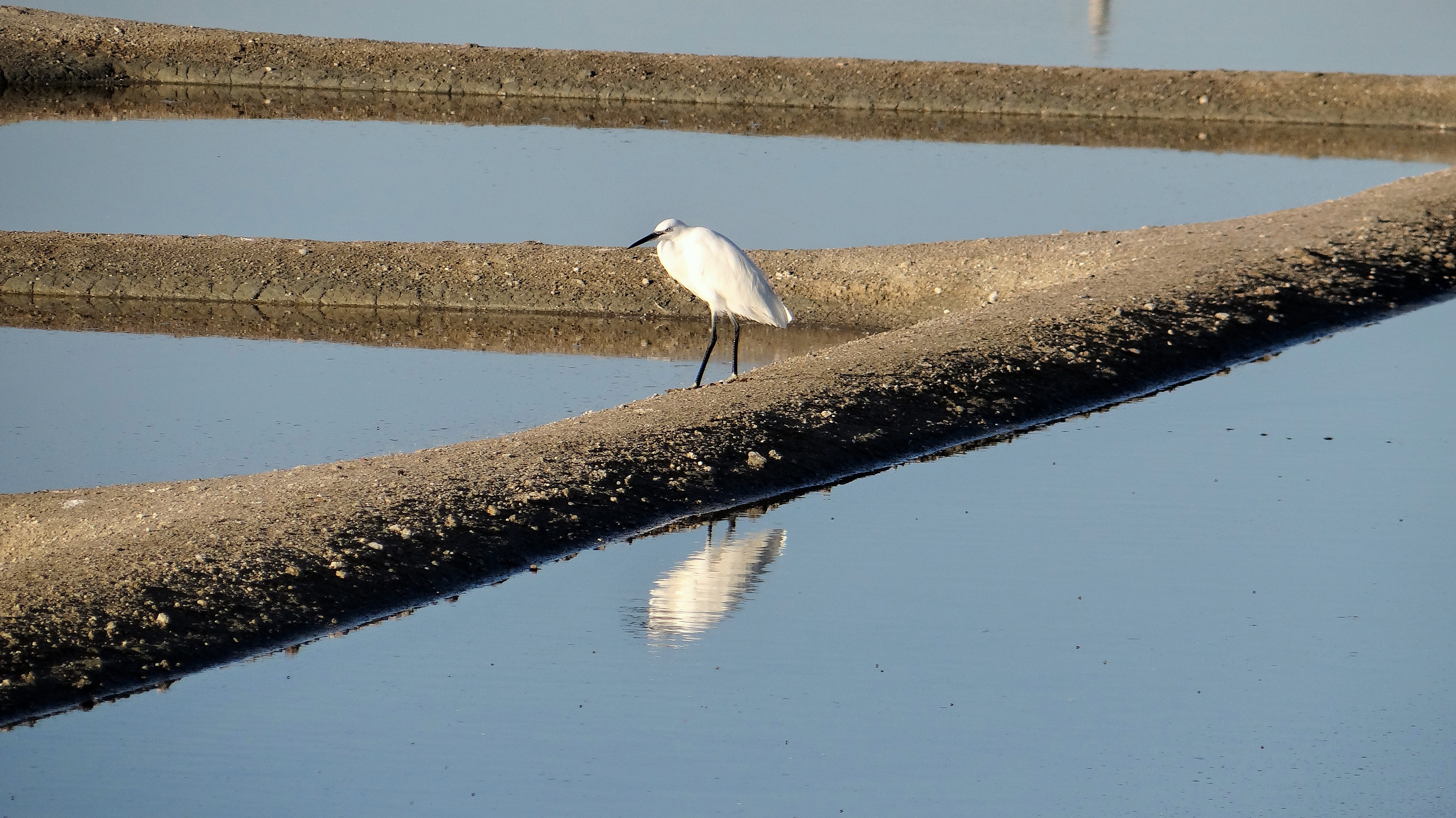 Marais salants de Guérande à l'automne